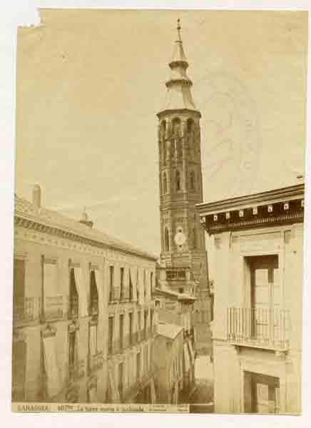 Zaragoza - Torre Nueva - Construida entre 1504-1512